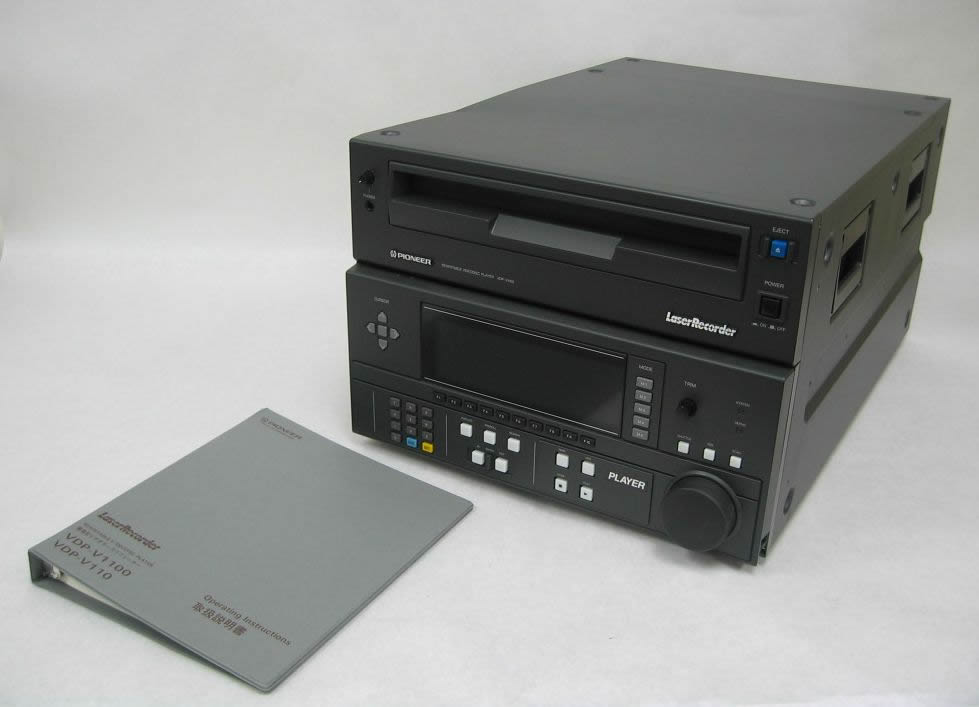 A Pioneer LaserDisc Recorder Deck. Author